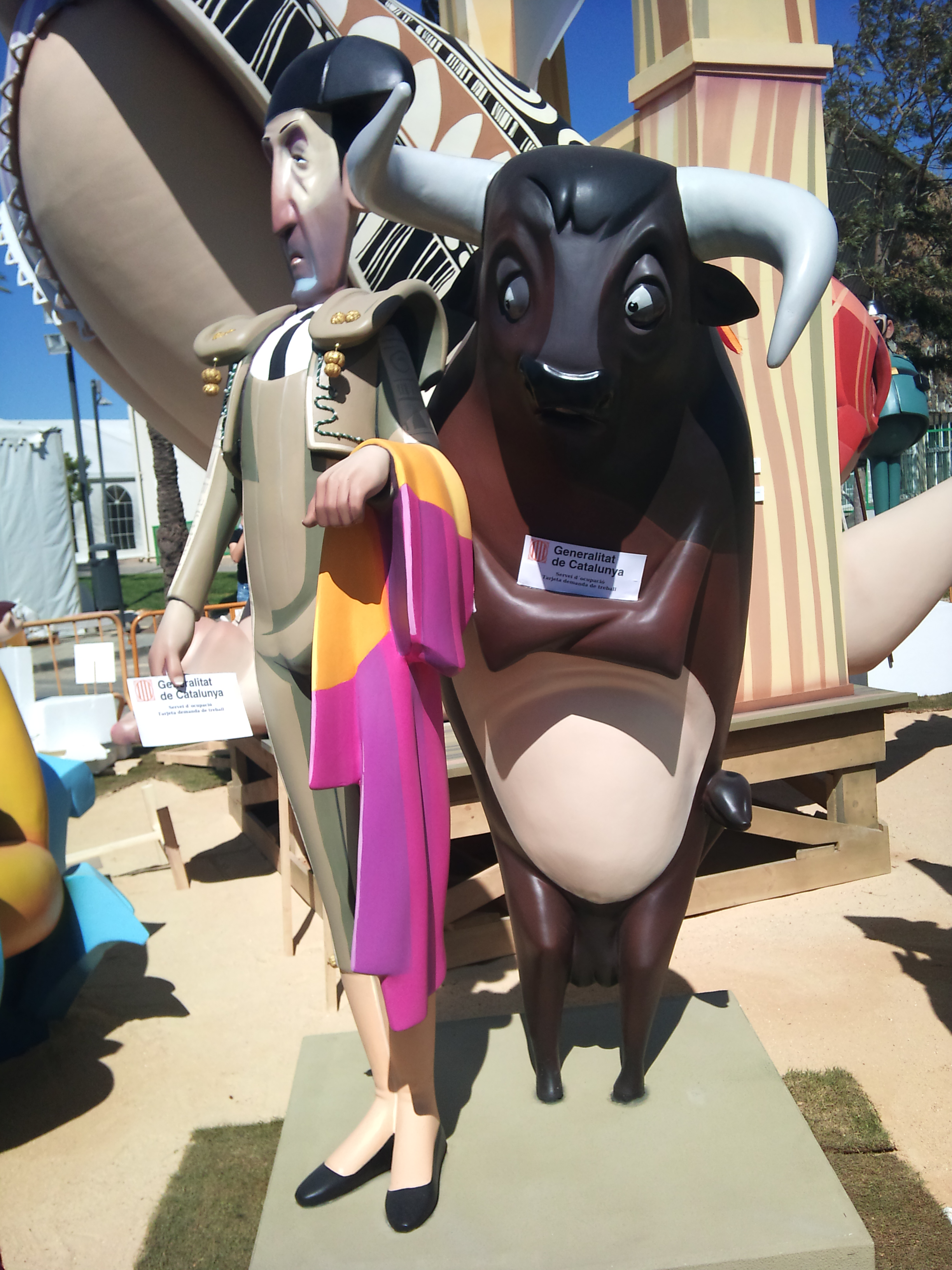 Ninot a la falla del Politècnic sobre l'abolició de la tauromàquia a Catalunya